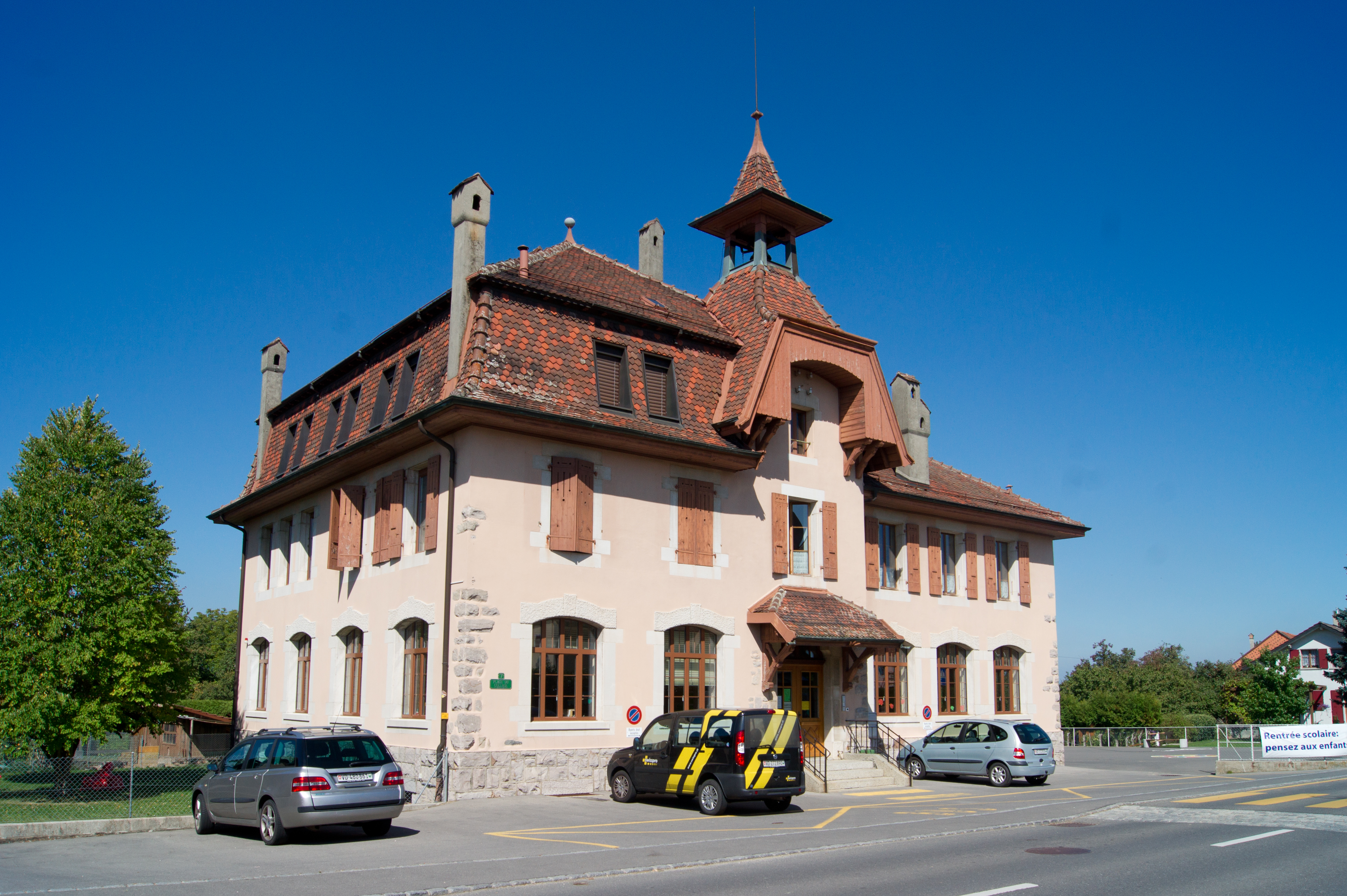 École à Poliez-le-Grand, canton de Vaud, Suisse.